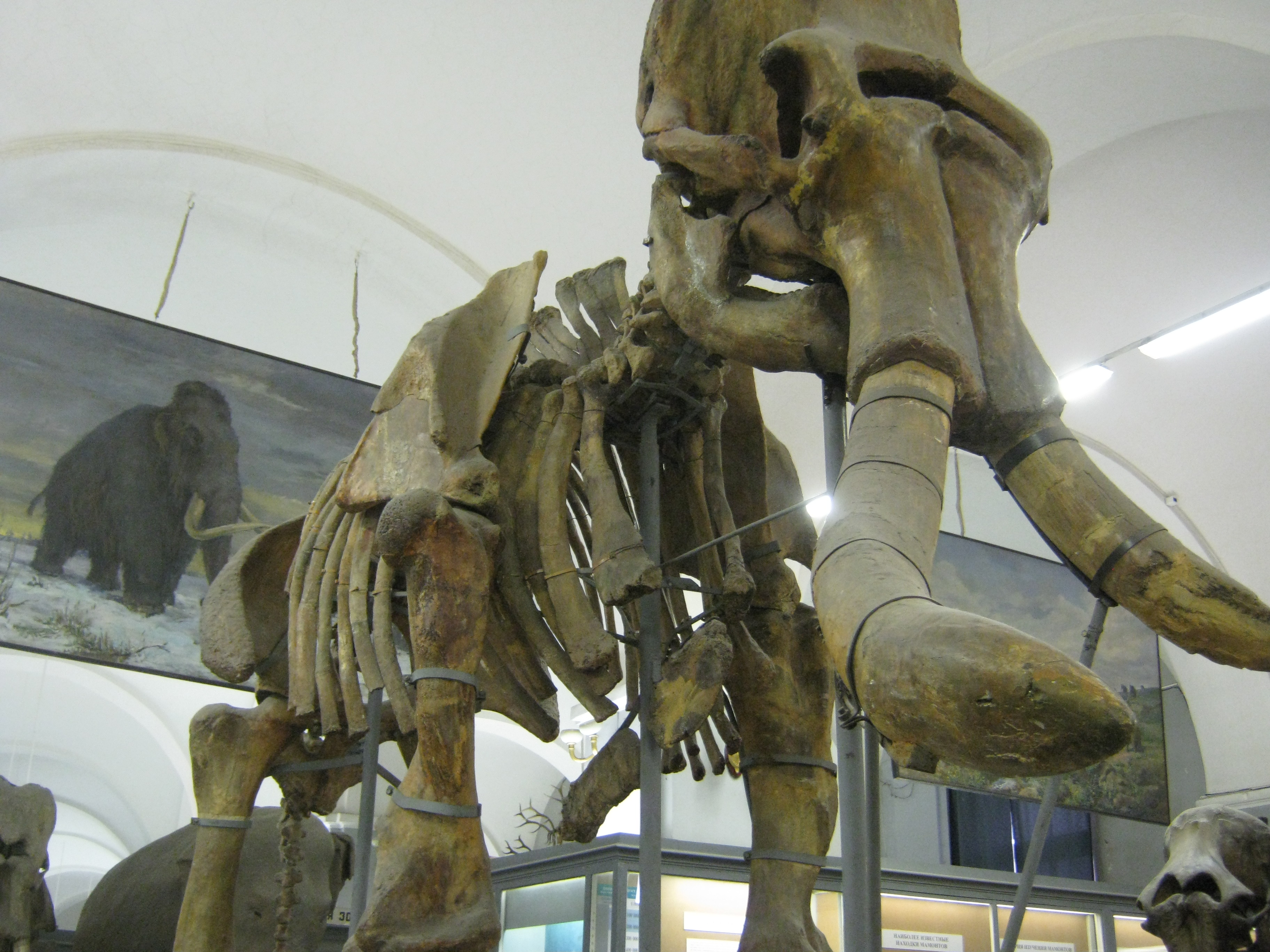 Второй обнаруженный скелет Южного слона выставленный в Санкт-Петербургский зоологический музей РАН.